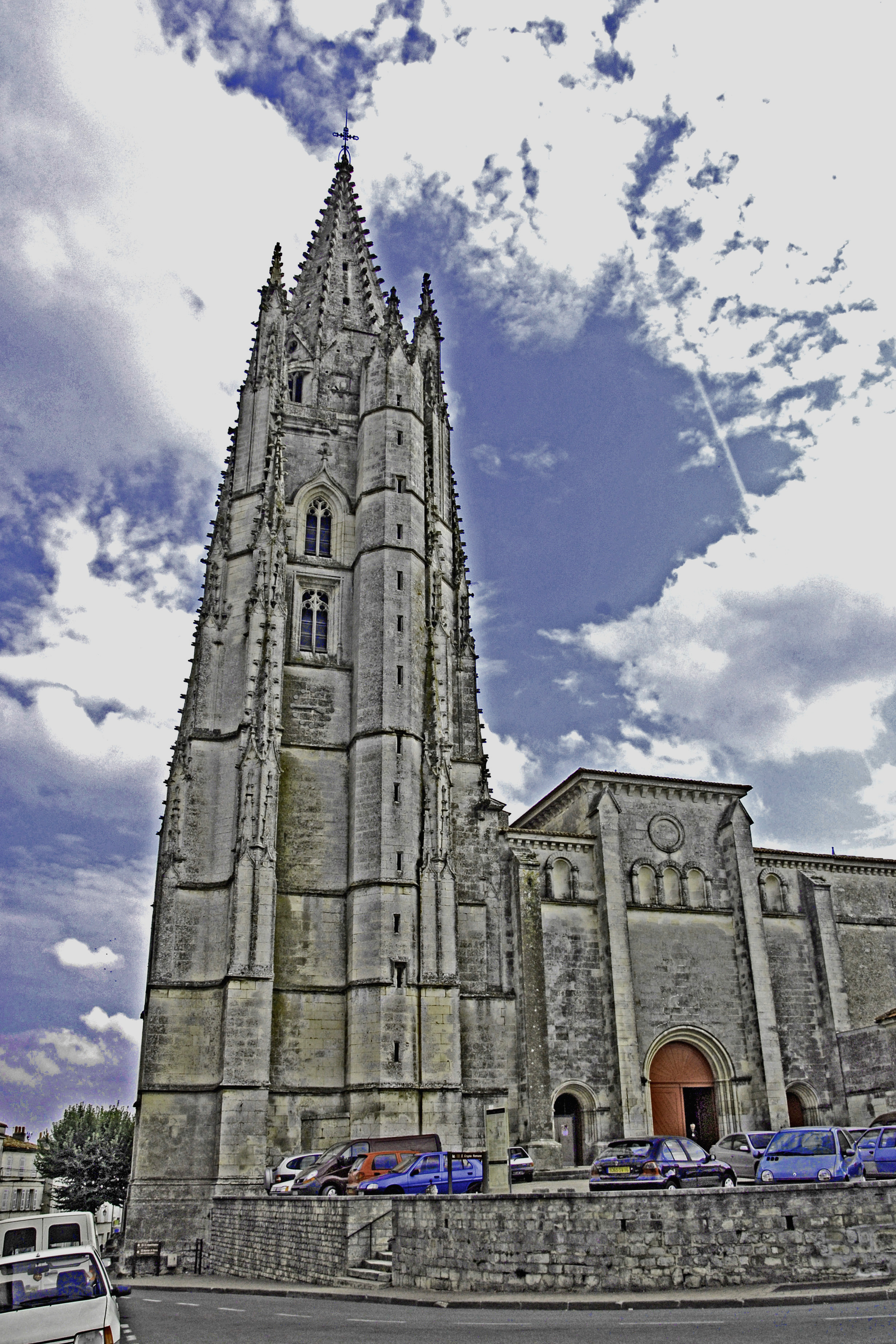 St.-Eutrope, Saintes, Glockenturm und moderne Fassade